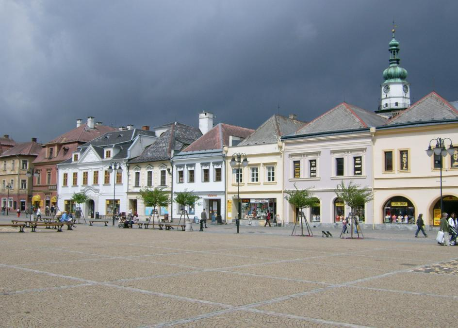 Náměstí v Bruntálu